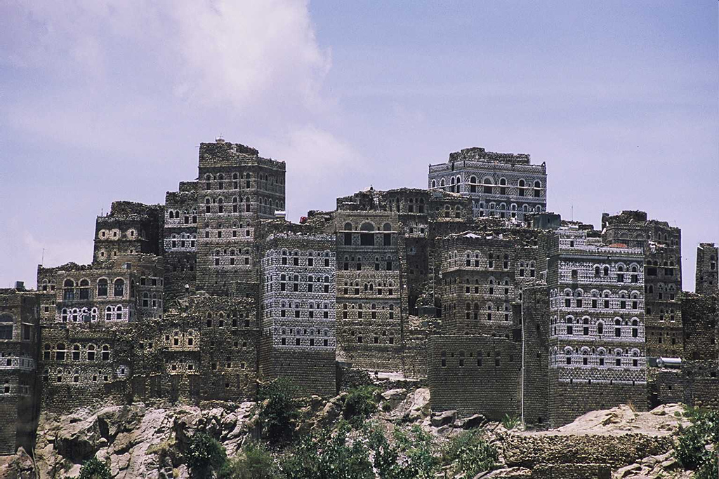 Al HajjaraYEMEN